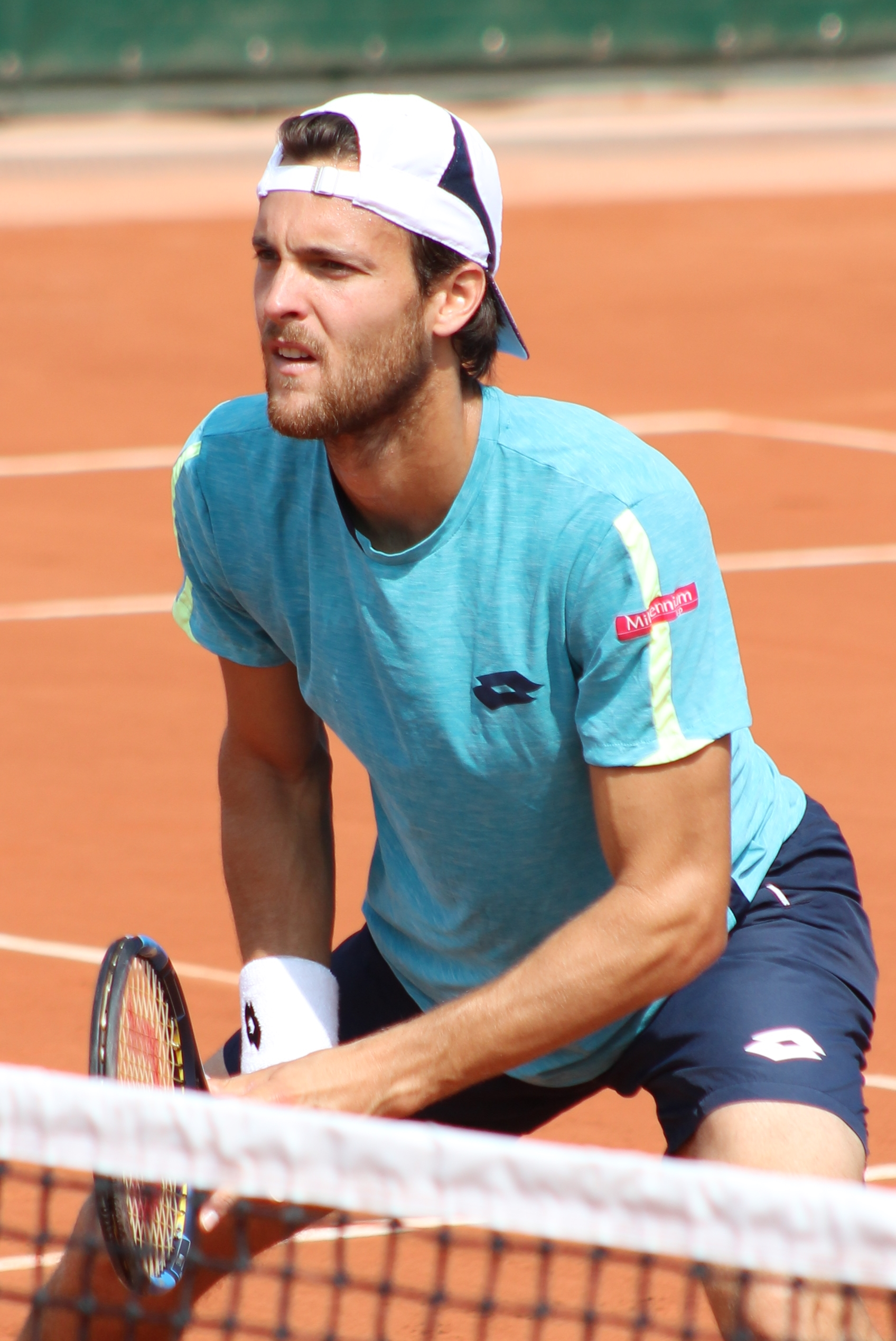 Sousa RG16 (2)